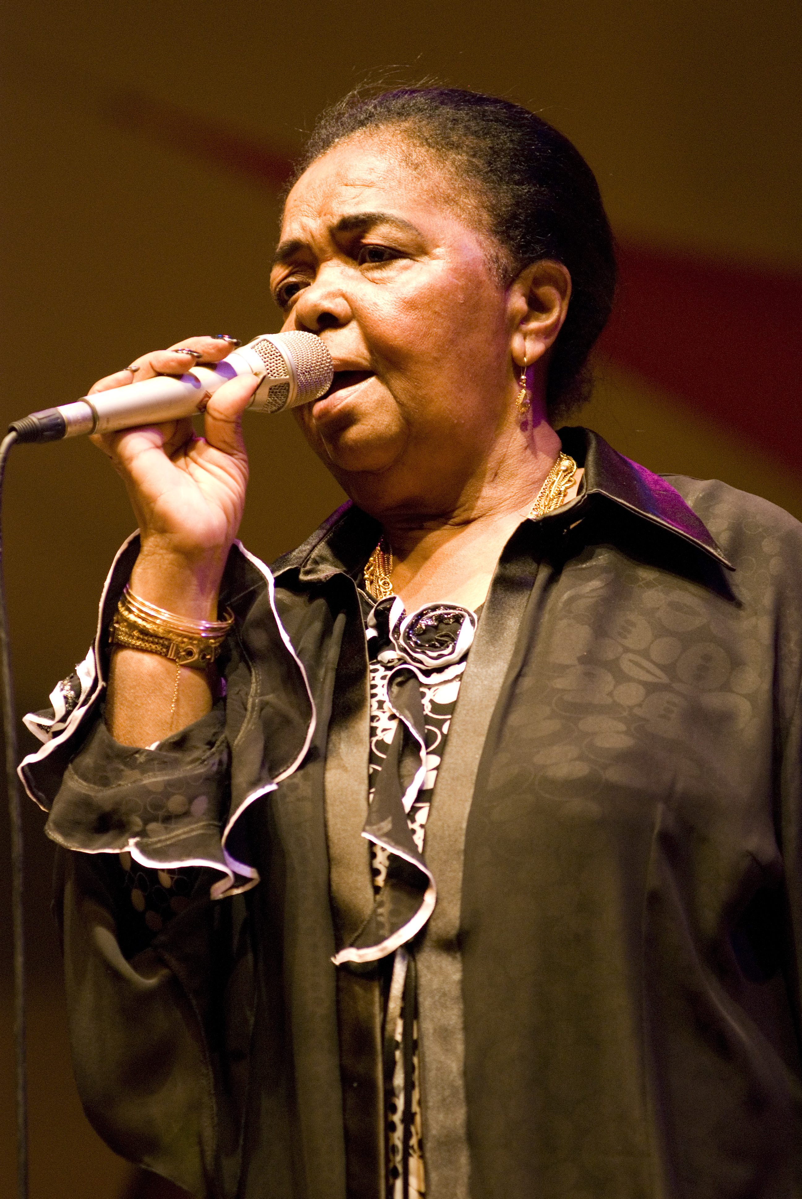 Foto: Silvio Tanaka.